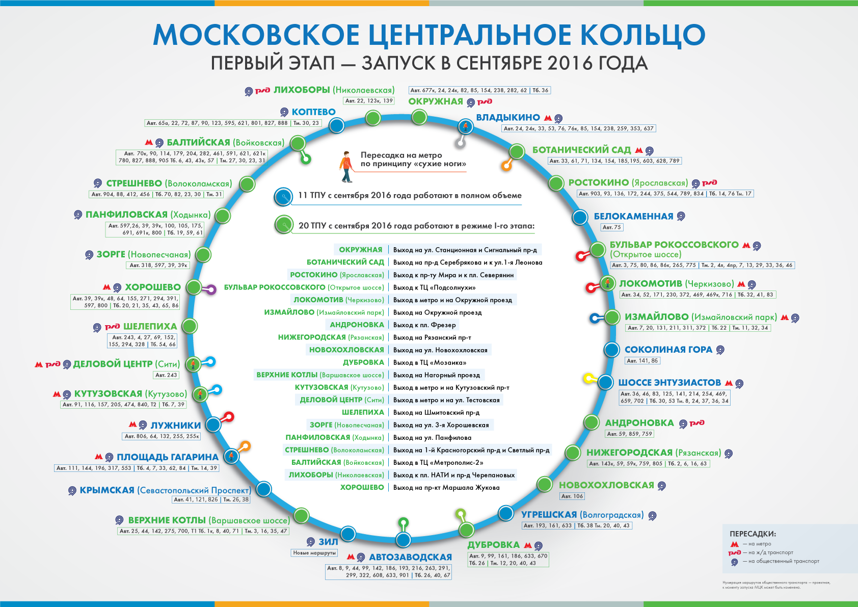 Схема пассажирских платформ Московского центрального кольца